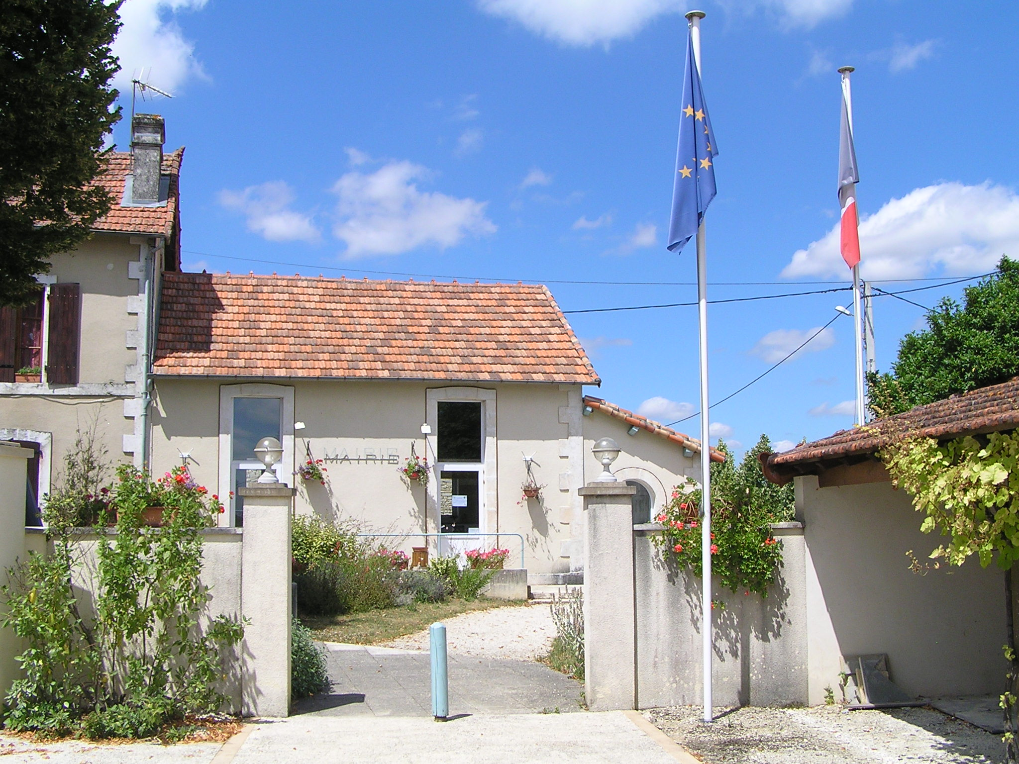 mairie des Gours